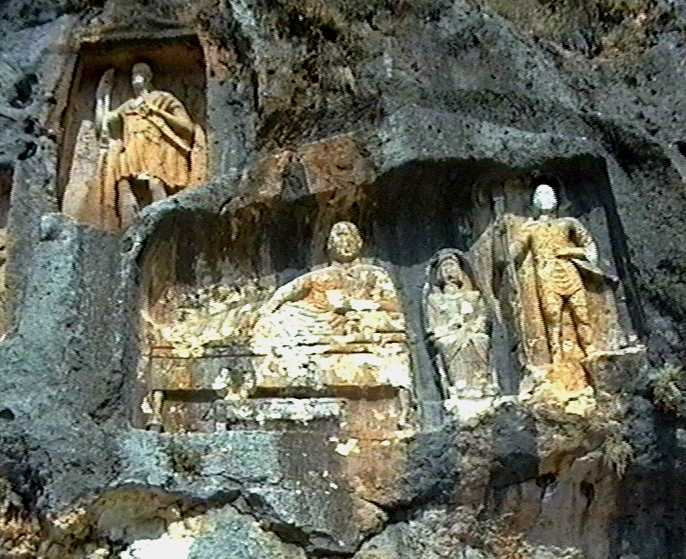 Adamkayalar, römische Grabreliefs bei Kizkalesi, Südtürkei